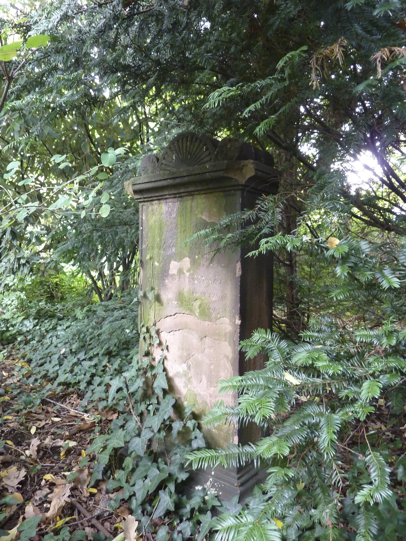 Frankfurt am Main, Stadtteil Bockenheim: Der Alte Friedhof Bockenheim ist ein von 1825 bis 1898 für Begräbnisse genutzter Friedhof, der im Jahr 1916 zu einer öffentlichen Grünanlage umgewidmet wurde. Das Foto zeigt einen zum Zeitpunkt der Aufnahme nicht identifizierbaren Grabstein auf dem ehemaligen Friedhof